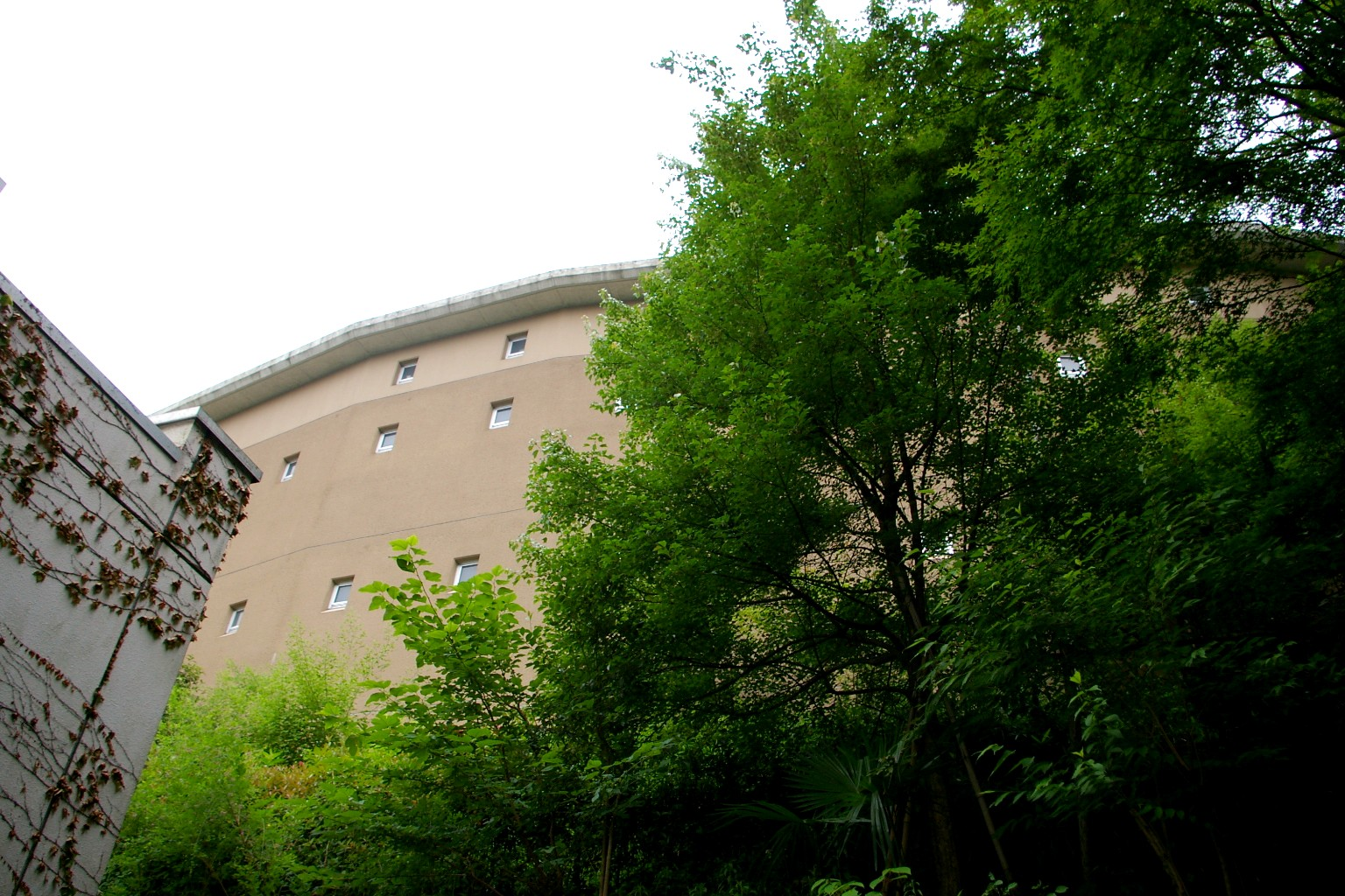 2009年7月、東京都港区明治学院前で投稿者が撮影。